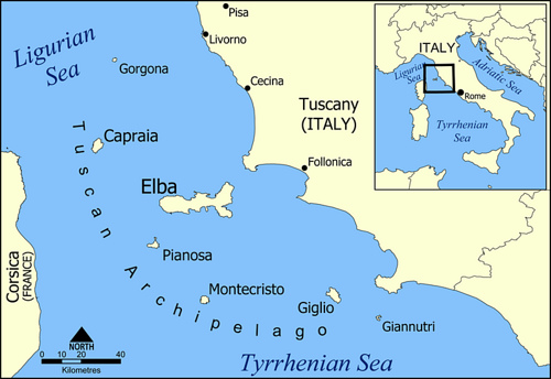 Carte de l'île d'Elbe.